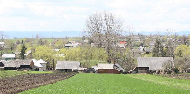 Satul Baineț, comuna Mușenița, județul Suceava.